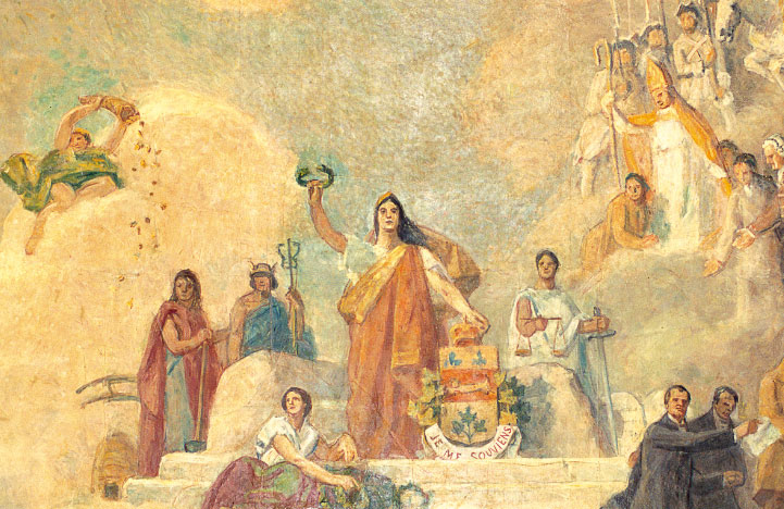 Détail de la toile « Je me souviens », de Charles Huot, Huile sur toile marouflée sur le plafond de la Salle de l’Assemblée nationale du Québec. Collection Assemblée nationale, photographe Francesco Bellomo. 1914-1920. « Je me souviens », au cœur de la Salle de l’Assemblée nationale. Détail de la toile « Je me souviens », de Charles Huot, au plafond de la Salle de l’Assemblée nationale. 1914-1920 Huile sur toile marouflée sur le plafond.